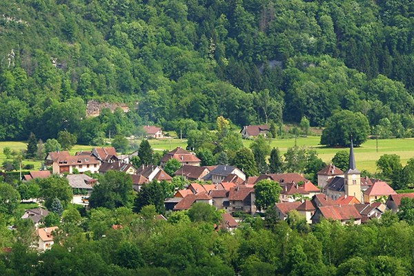 Le village de Saint Christophe sur Guiers - Isère- France